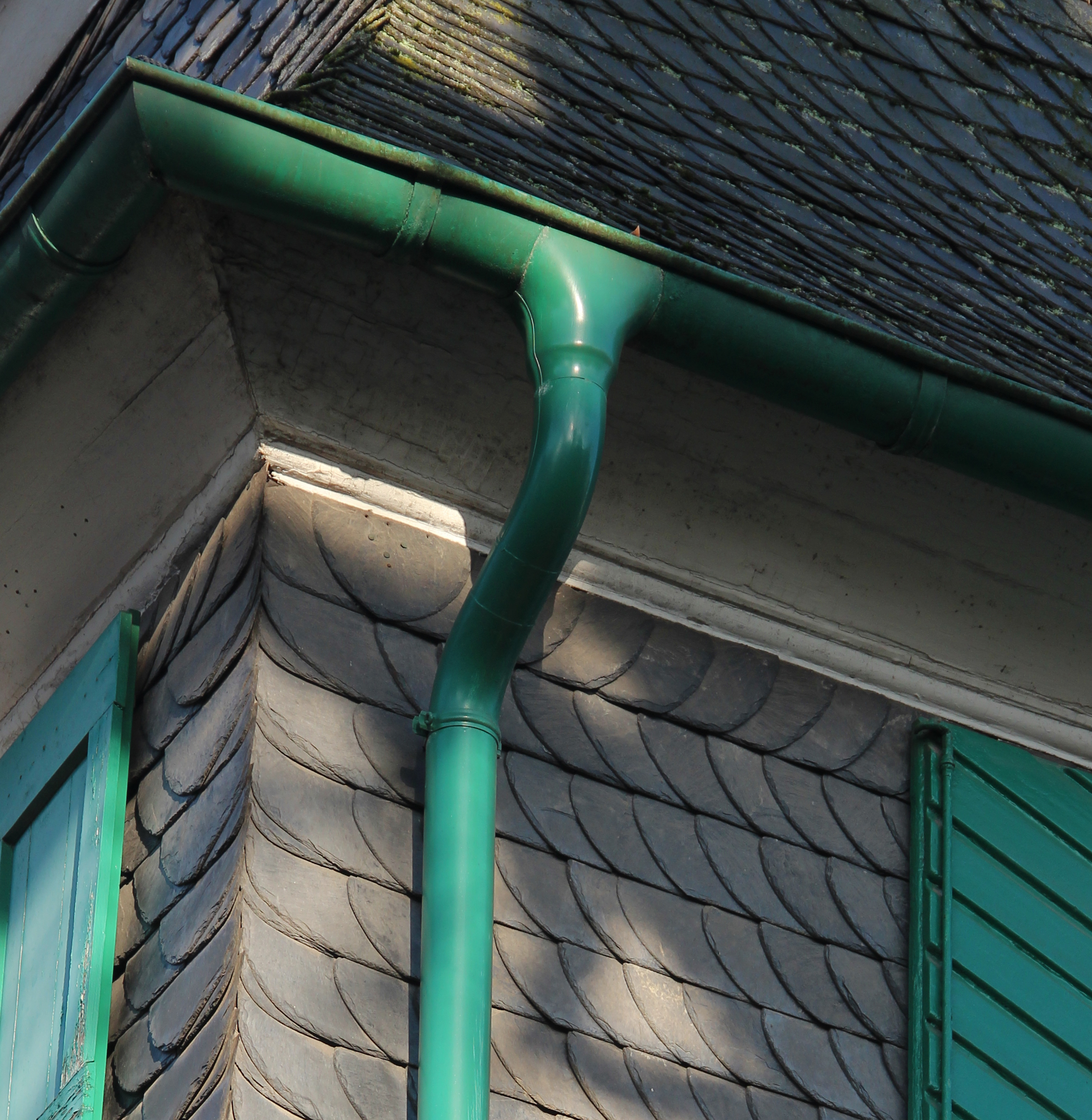 Woonhuis Düsseldorfer Straße 20 te Mettmann - Detailopname van regengoot en -pijp in Bergs Groen